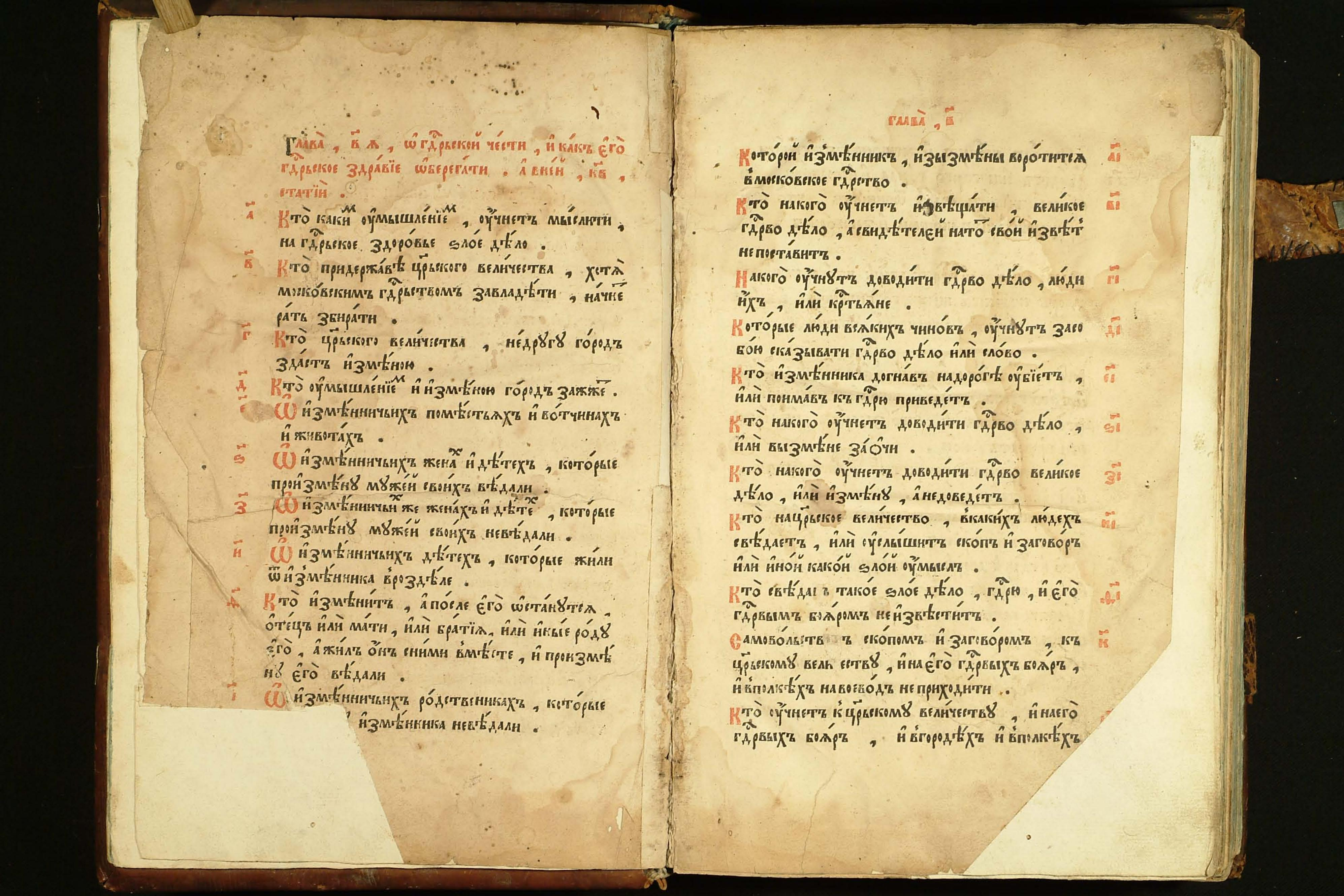 Соборное уложение. Начало главы II «О Государской чести, и как Его Государское здоровье оберегать»